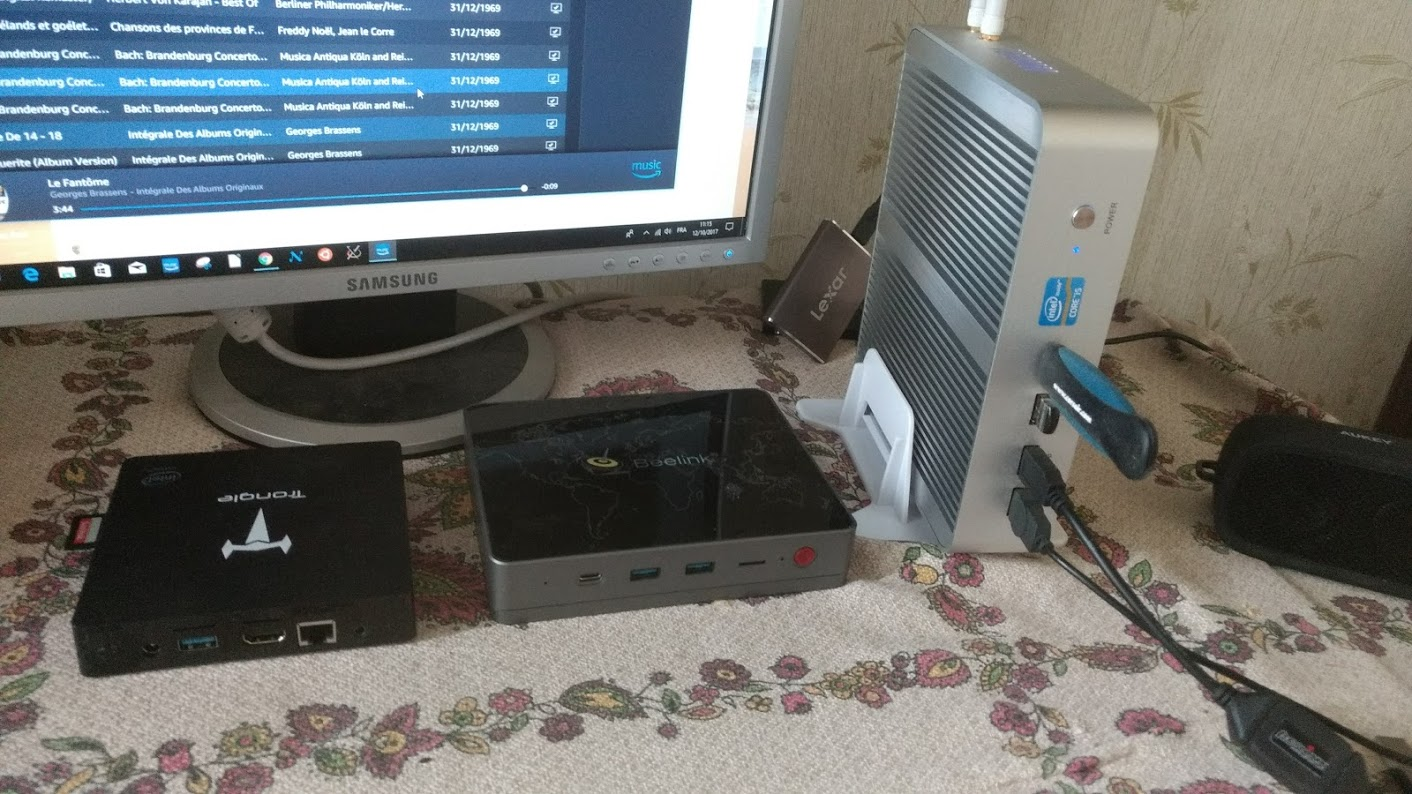 Les mini-PC existent en diverses tailles. Ici, un "palm"-PC 8350 à 2 Go, un mini-PC équipé de 3400 4 Go et un mini PC plus gros motorisé par un 6260 ULV 8 Go. Tous ont un refroidissement totalement passif.